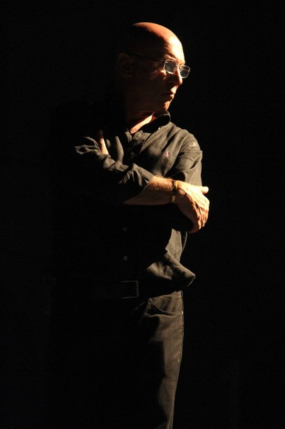 Paolo Bosisio